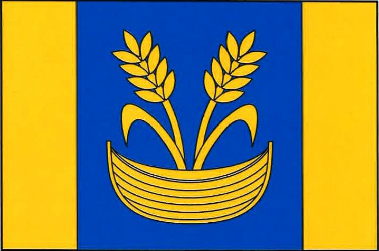 Vlajka, Suchodol, okres Příbram